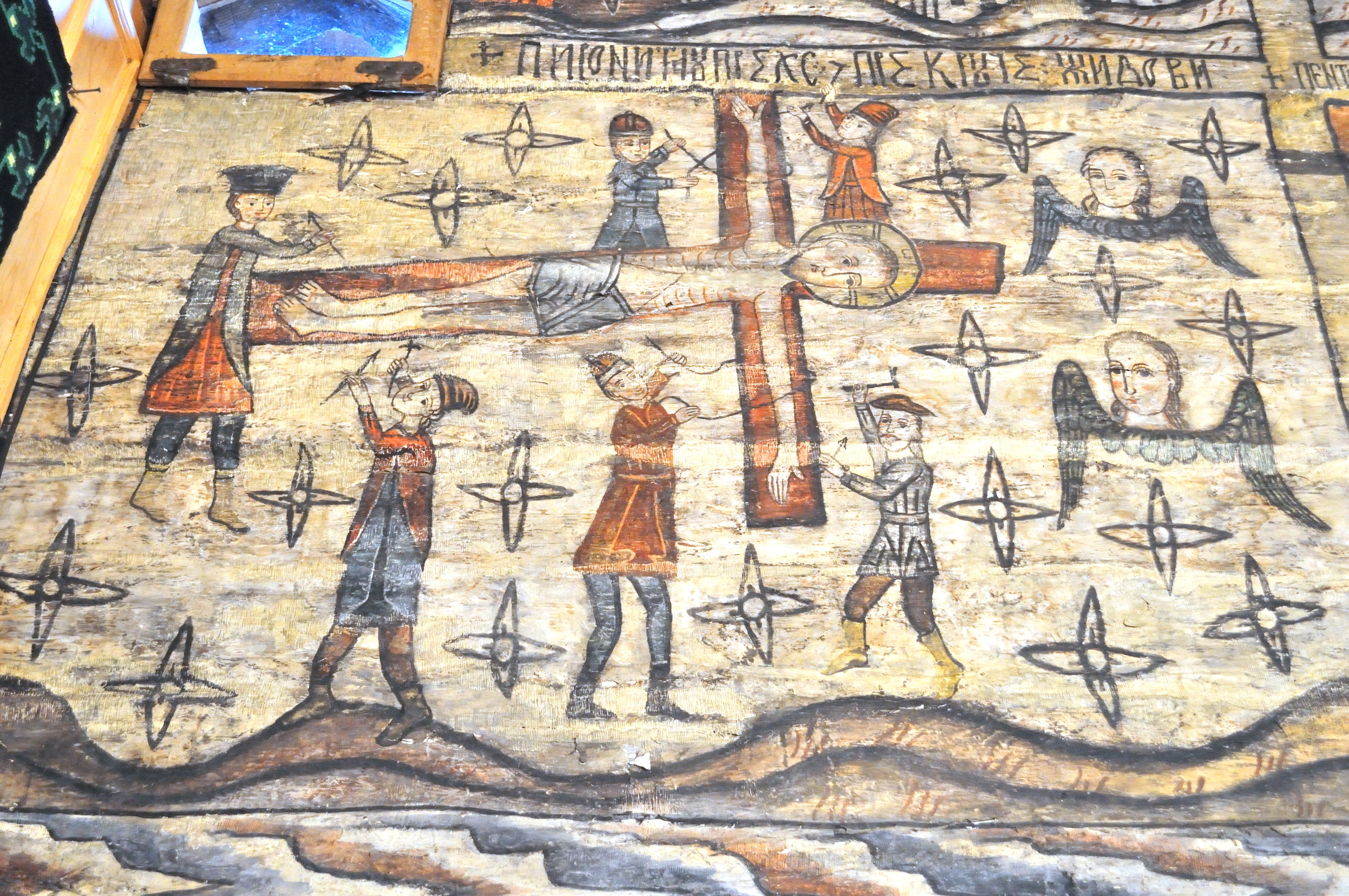 Biserica de lemn „Cuvioasa Paraschiva" din Desești, județul Maramureș